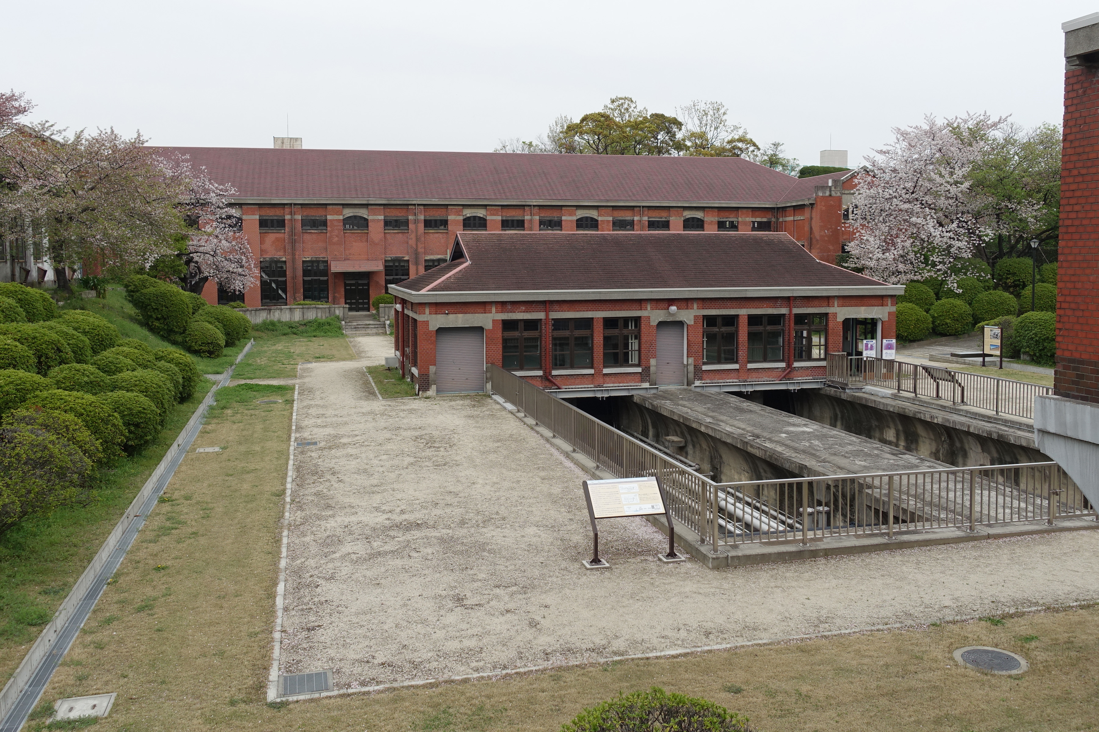 旧三河島汚水処分場喞筒場施設（2007年日本の重要文化財に指定）外観。